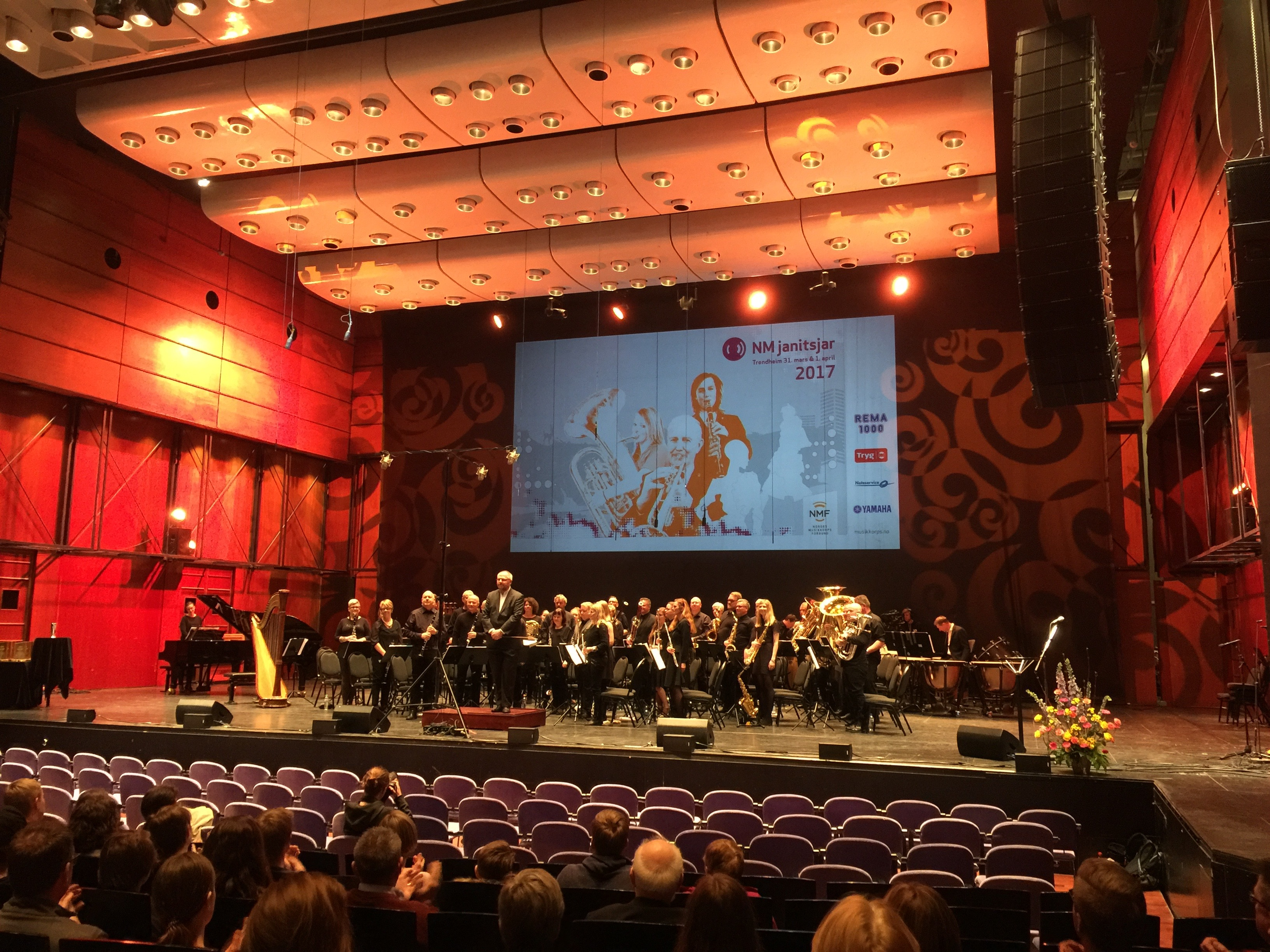 NM janitsjar 2017